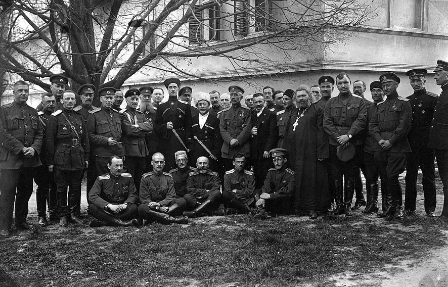 Сремски Карловци, 22 марта 1925 г. В центре барон П.Н.Врангель, у его ног, в нижнем ряду третий слева сидит В.Х.Даватц Russian emigration in Yugoslavia. City Of Sremski Karlovci. in March 22, 1925 Baron Wrangel, P.N. at his feet on the bottom row, third from the left sits V.H. Davatc